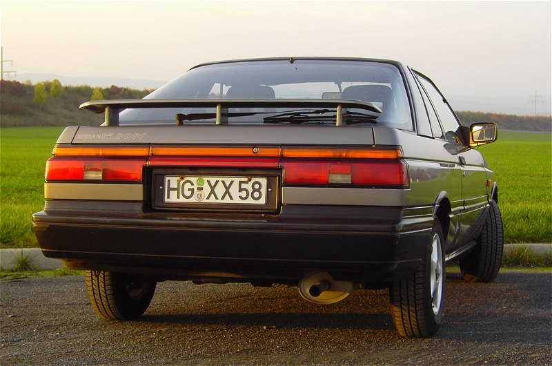 1987er Nissan Sunny B12 mit E16i-Maschine (1,6l, 4 Zylinder, 73PS)